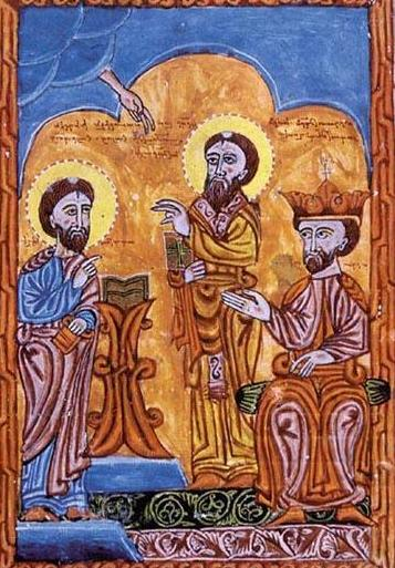 Страница рукописи Агатангелоса